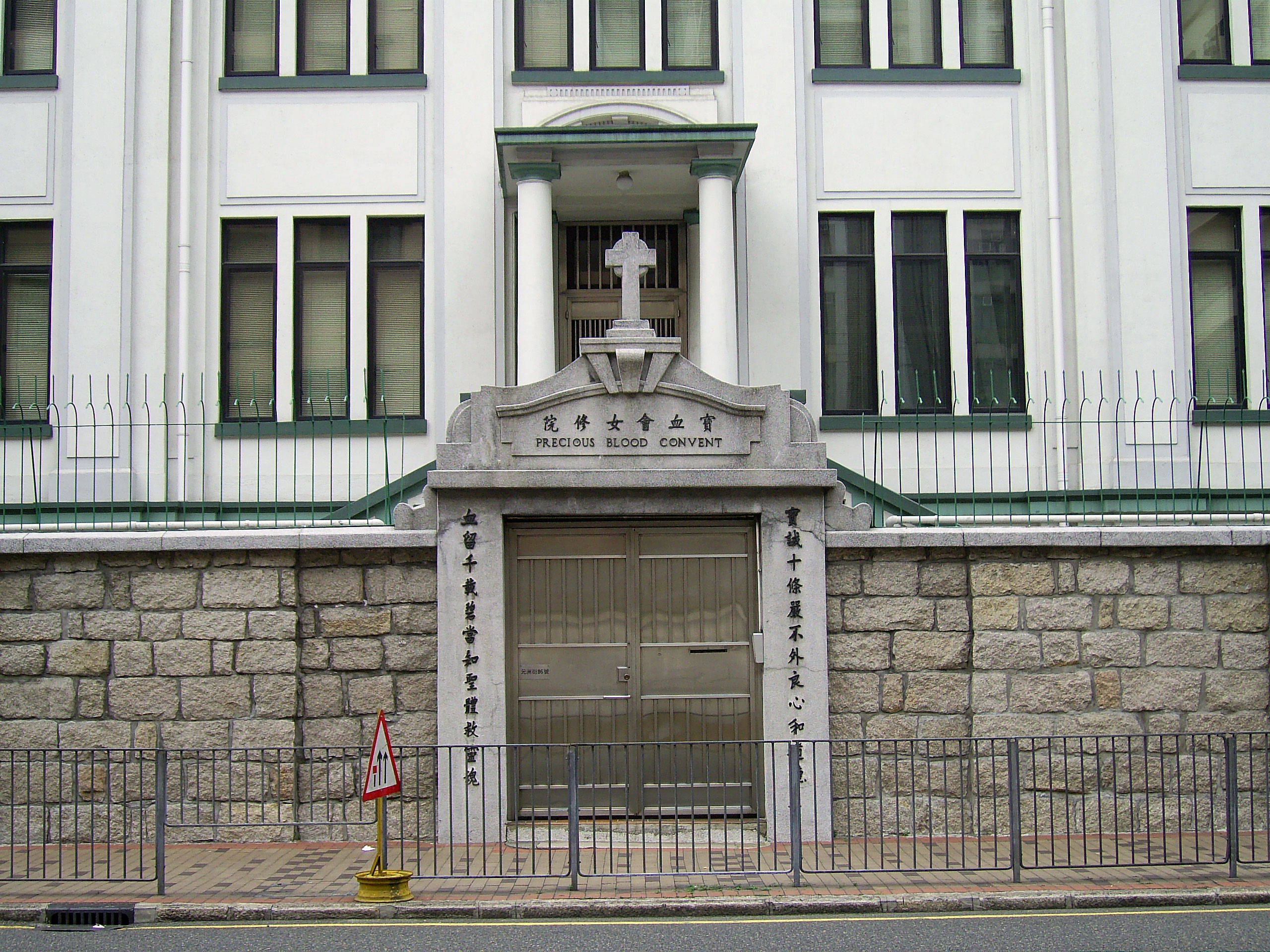 中文（香港）: 寶血會女修院